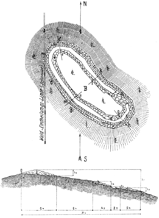 Půdorys hradiště Hradec u Dobřejovic